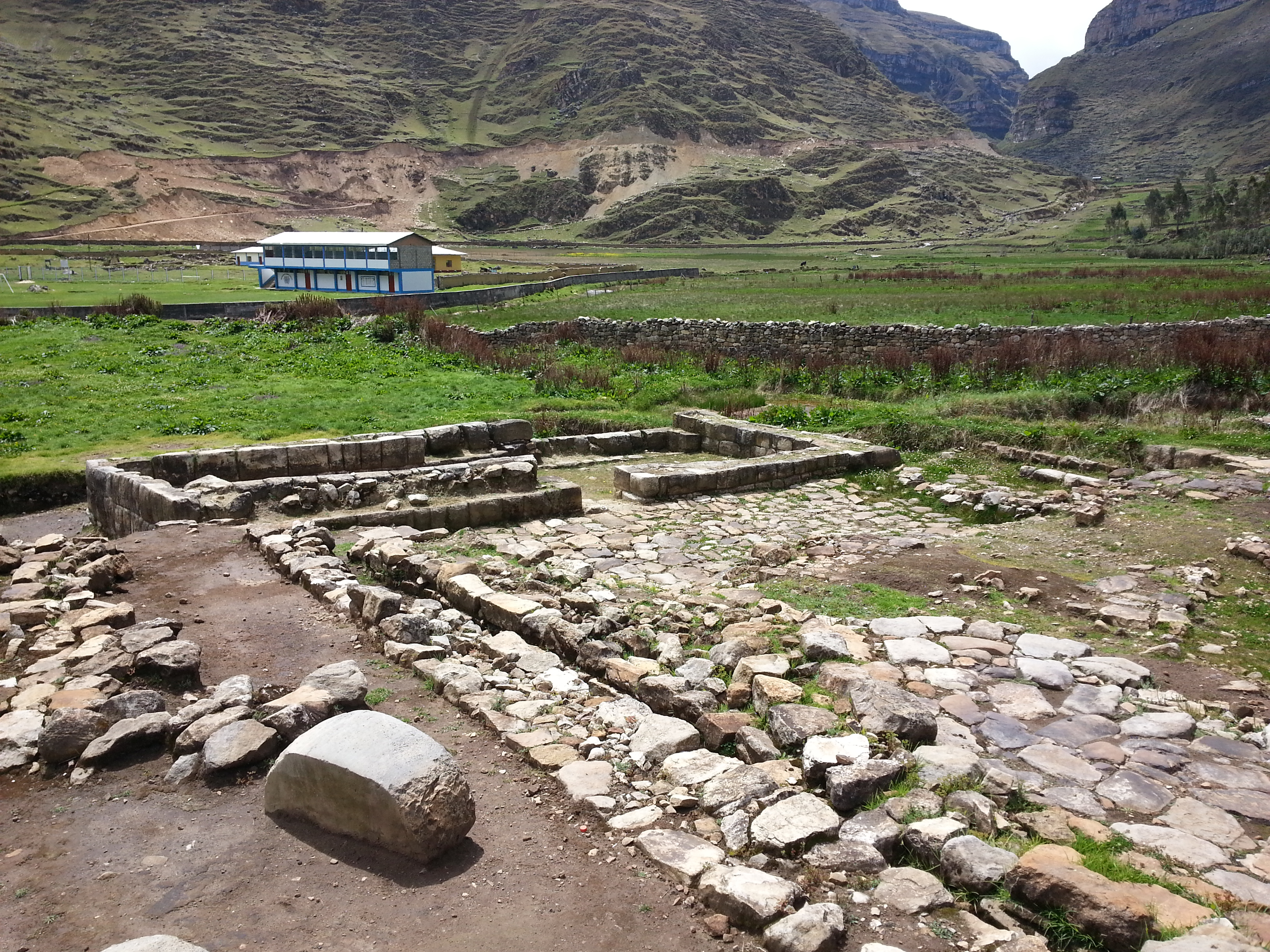 Edificio parte del complejo arqueológico Inca de Huarautambo, Yanahuanca, Pasco.